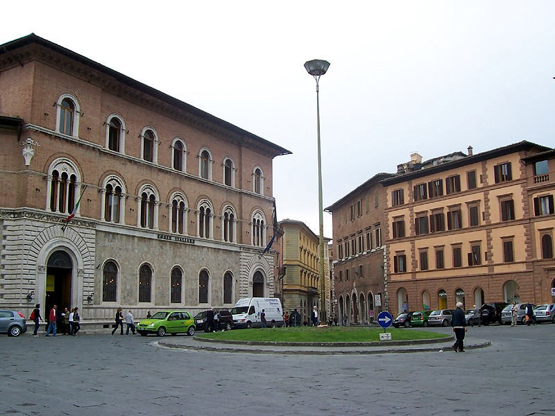 Siena - Piazza Matteotti